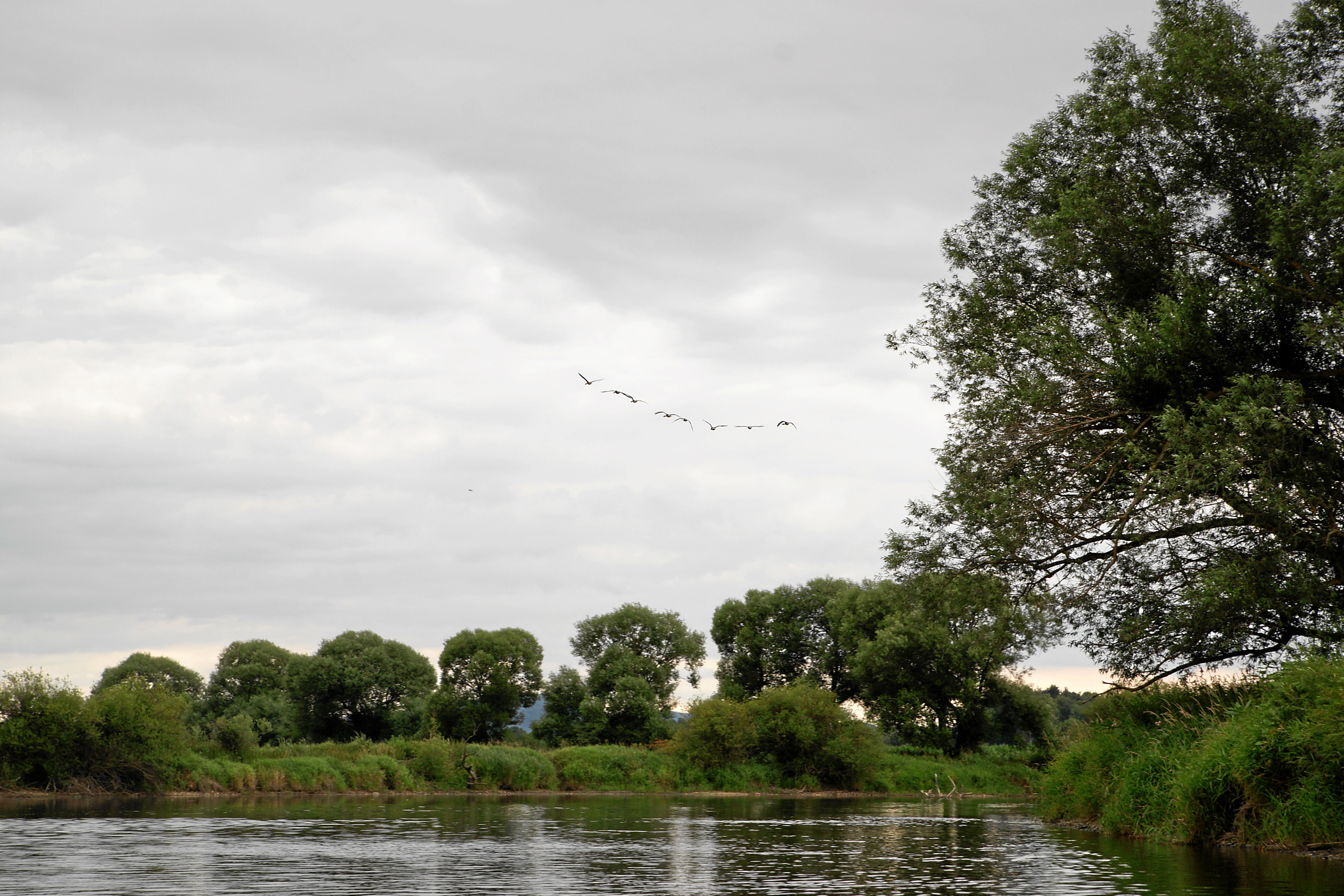 Regentalaue nach Loibling